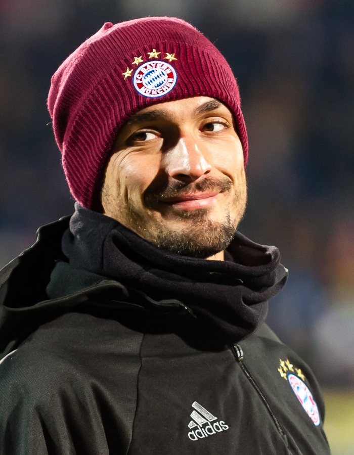 Матс Хуммельс